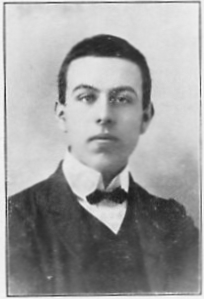 Edmund Privat, Ĝenevo, redaktoro de "Juna Esperantisto".